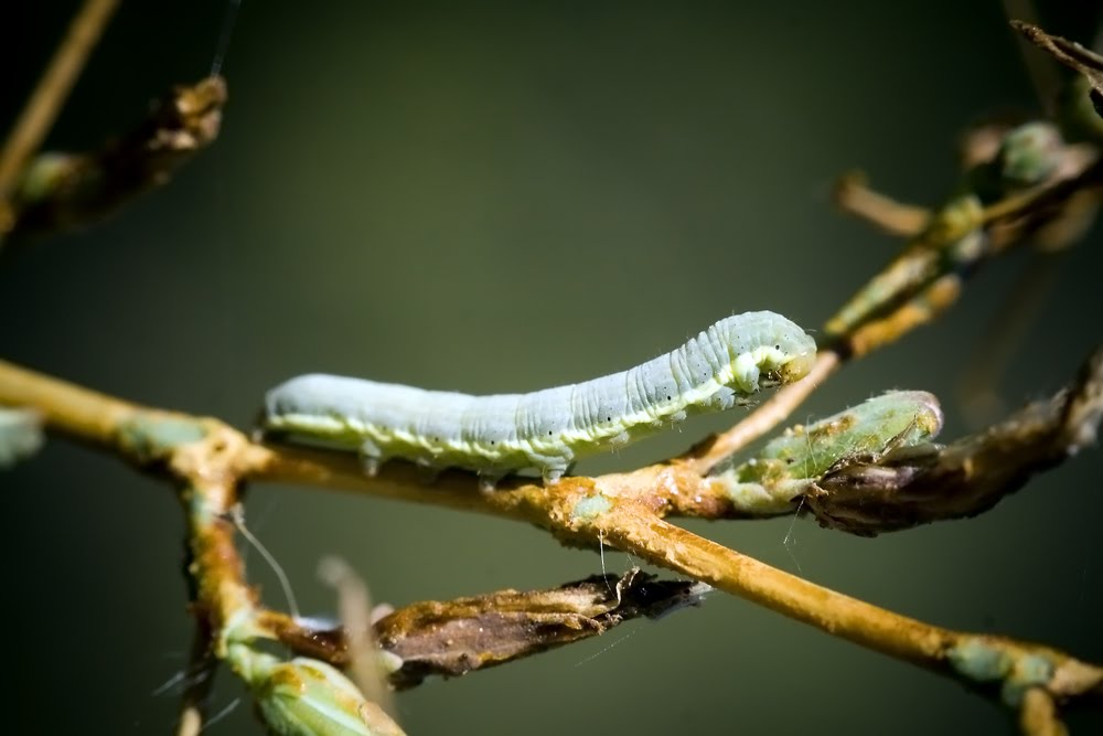 Pterostoma palpina caterpillar